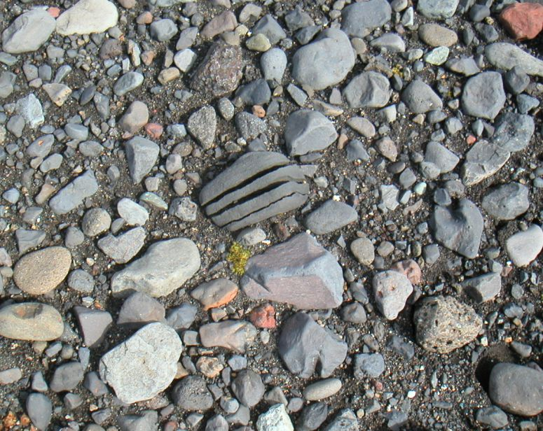 gélifraction d'un galet basaltique